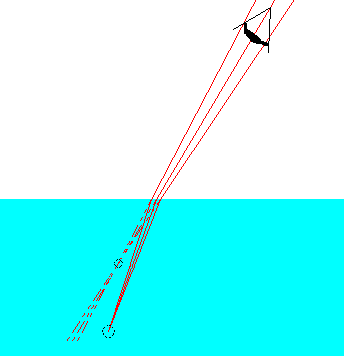 Stigmatisme approché, cas de l'aquarium (Schéma personnel) Schémas|Physique